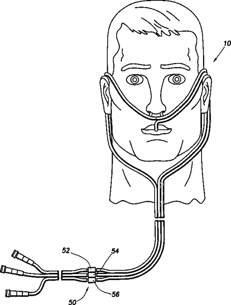 Drawing of a nasal cannula